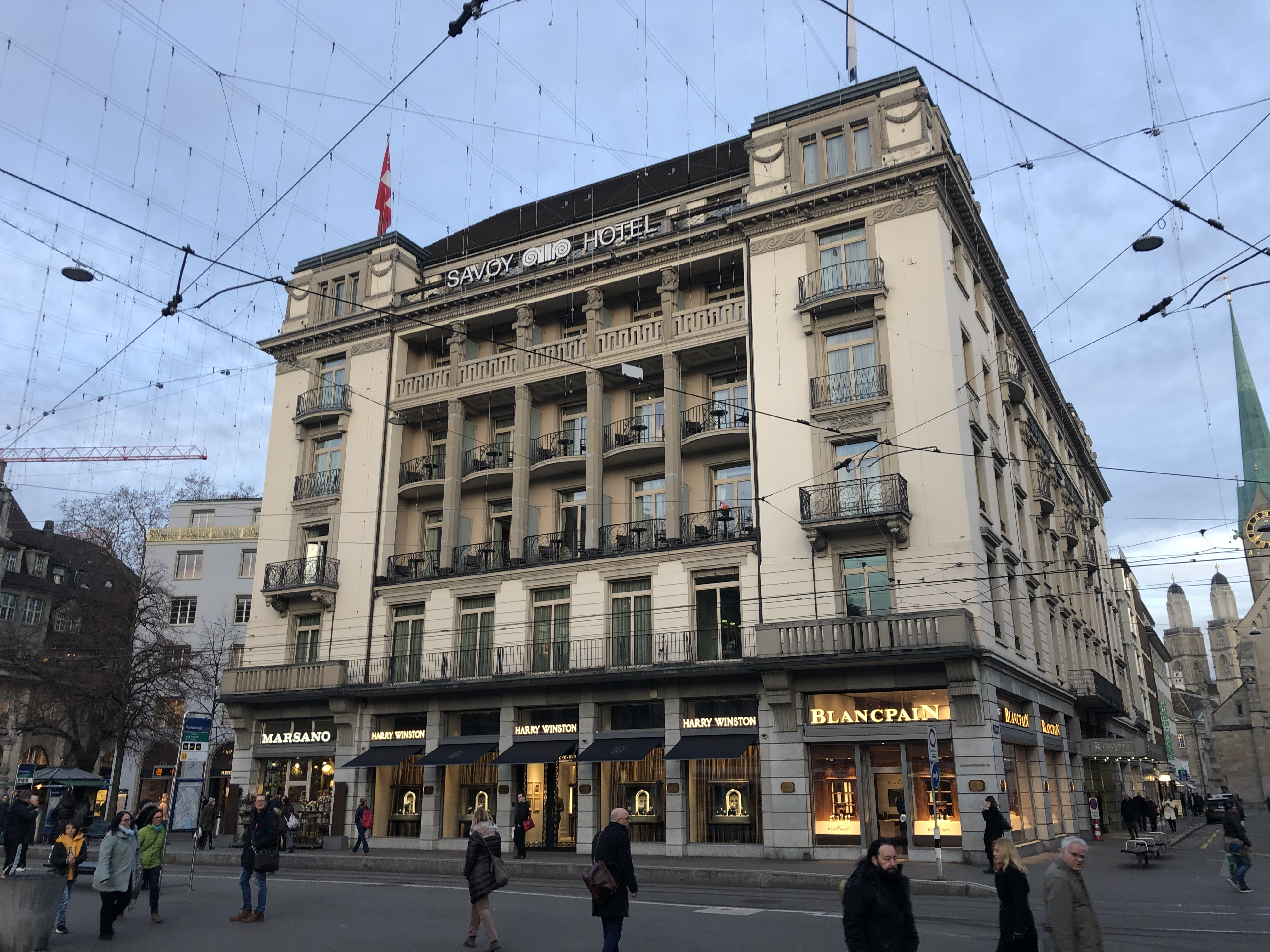 Baur en Ville